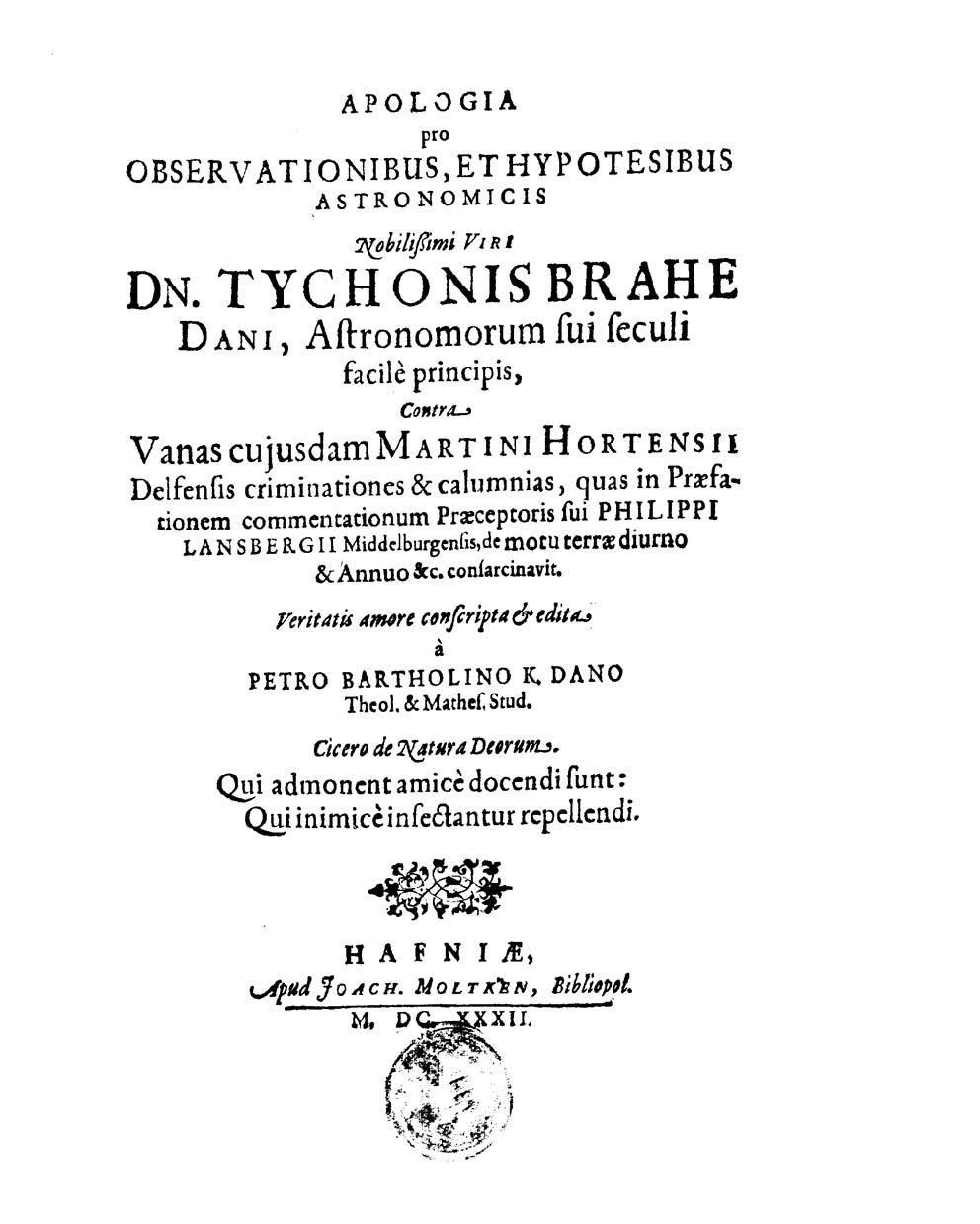 Apologia pro observationibus, et hypotesibus astronomicis nobilissimi viri Dn. Tychonis Brahedani astronomorum sui seculi facile principis, contra vanas cujusdam Martini Hortensii ... criminationes & calumnias ... edita a Petro Bartholino K. Dano .... - Hafniae : apud Joach. Moltken …, 1632. - [110] p. ; 4º .